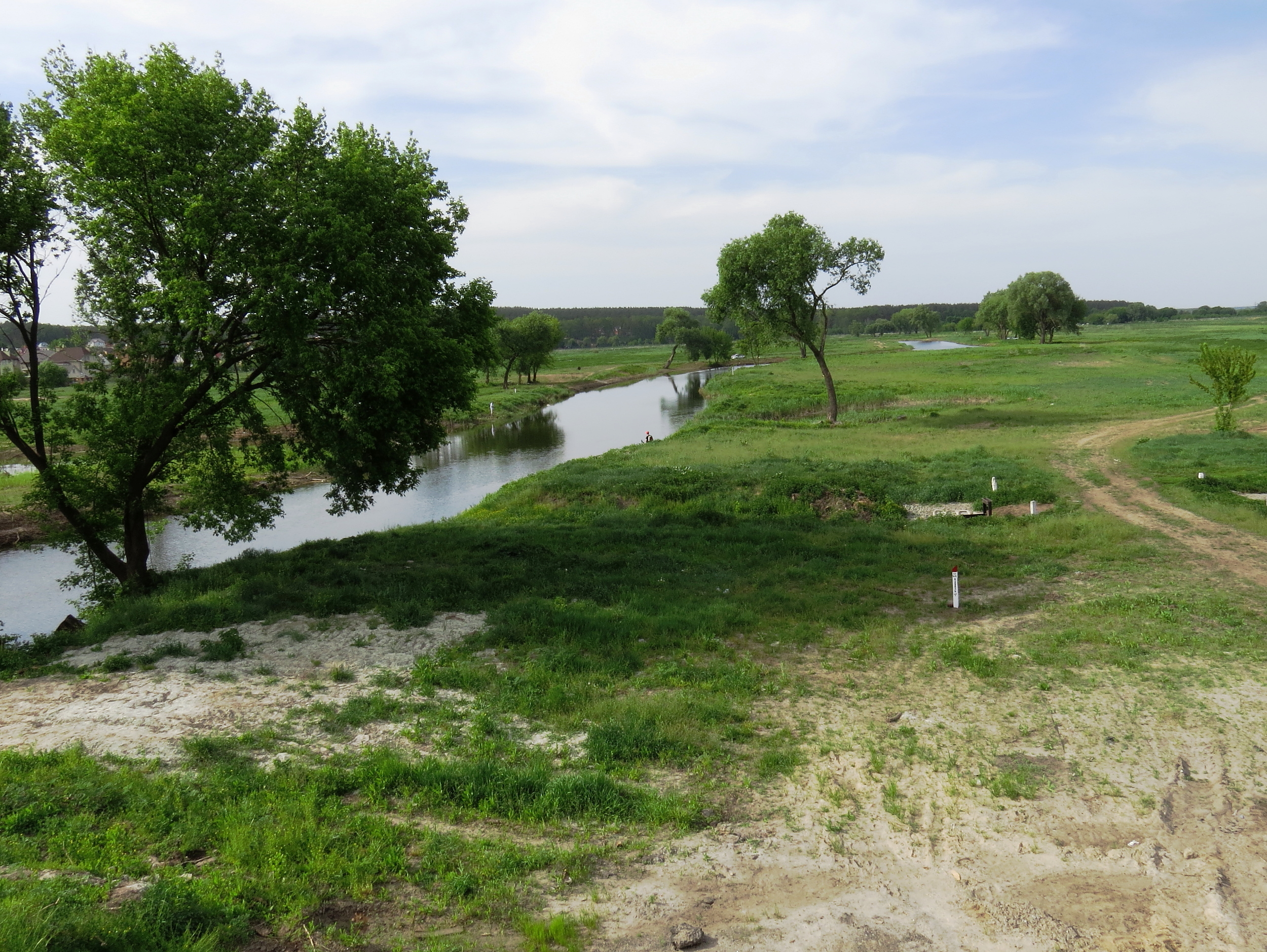 вид на р. Ирпень с моста автодороги М06